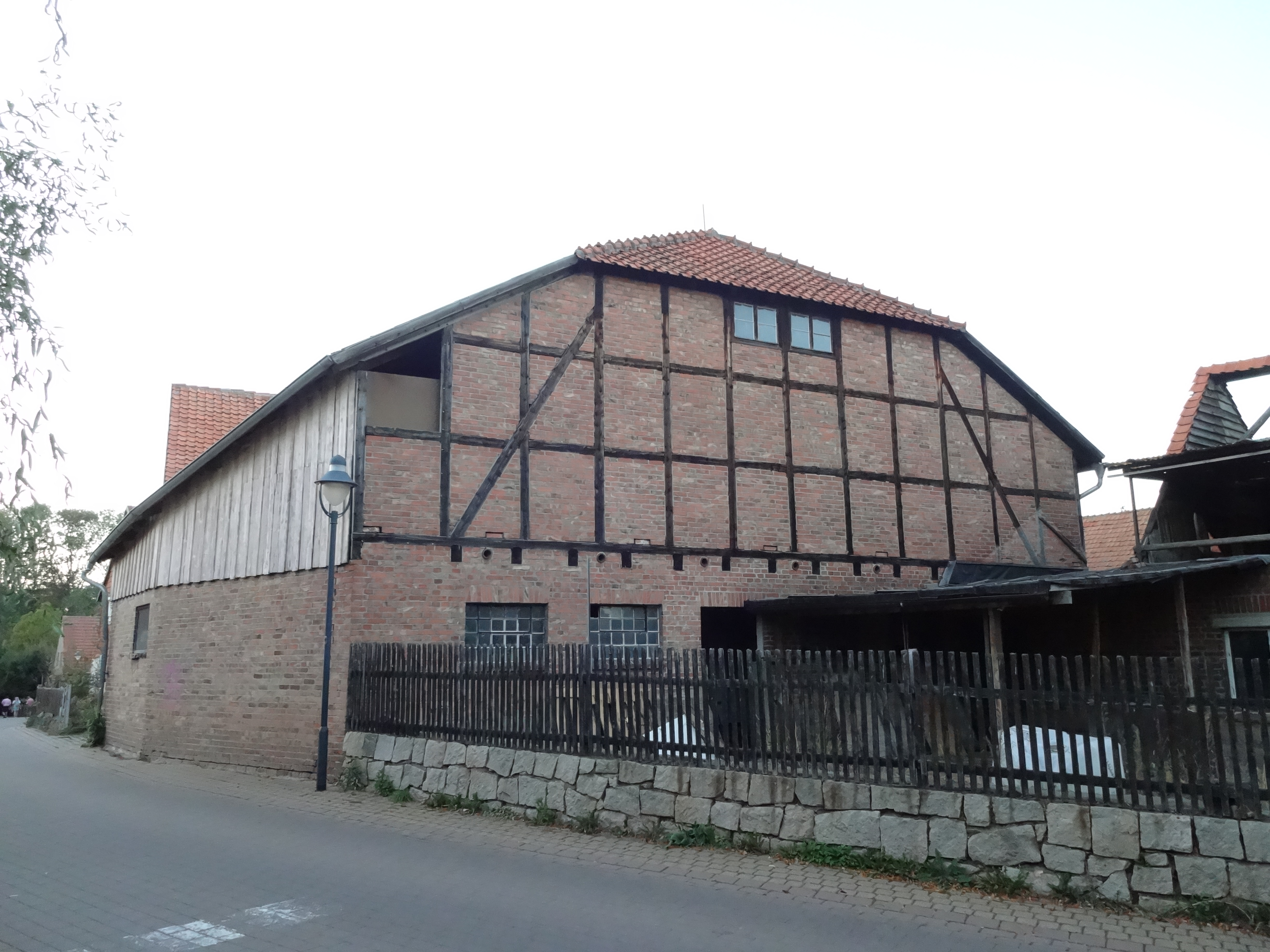 denkmalgeschützter Bauernhof in der Straße der Republik 32 in Darlingerode